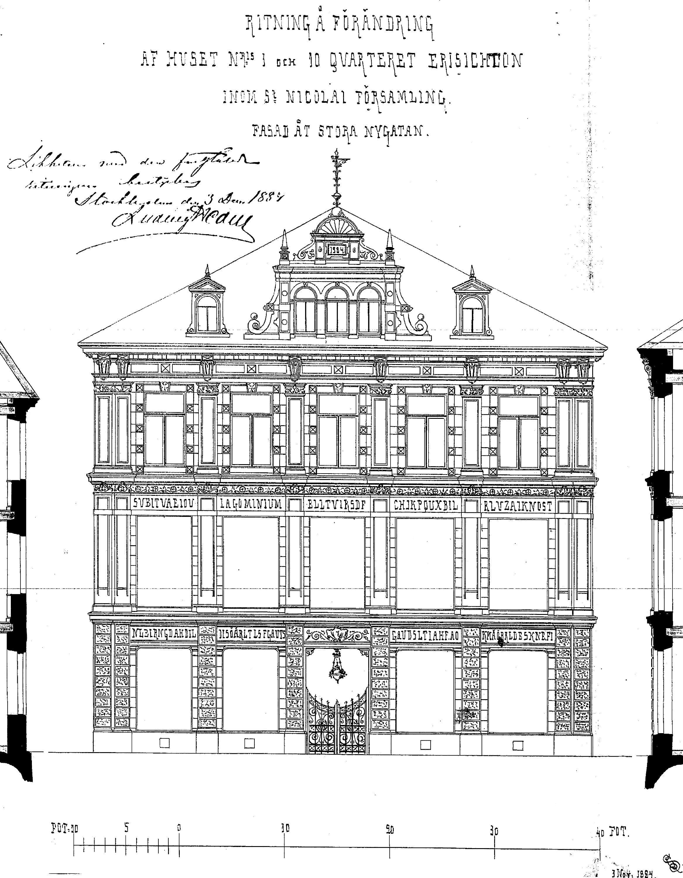 Fasadritning Stora Nygatan 7, Erisichton 1.